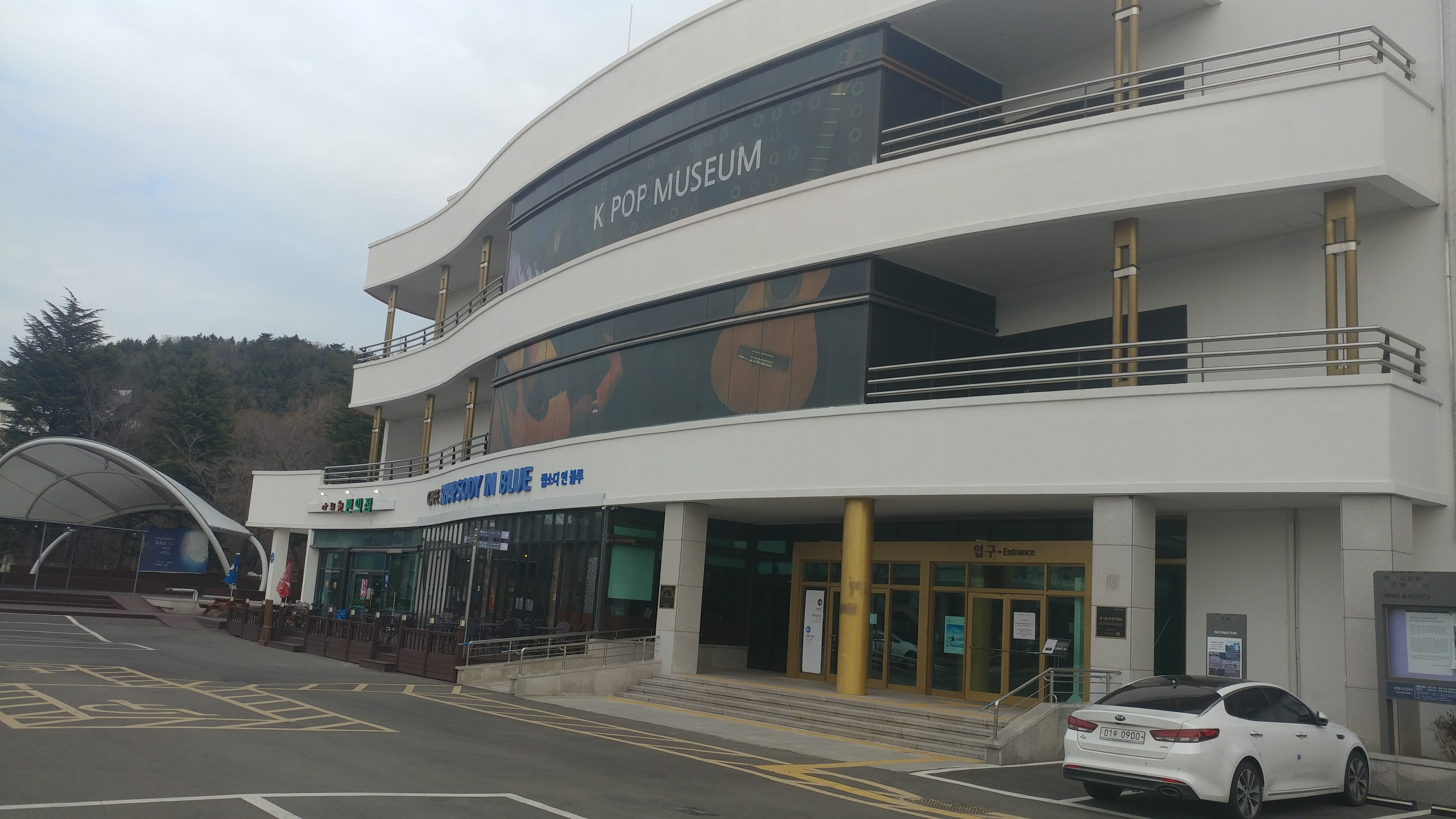 경주에 위치한 대중음악박물관